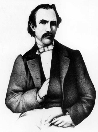 Lithuanian writer Mikalojus Akelaitis (1829-1887)